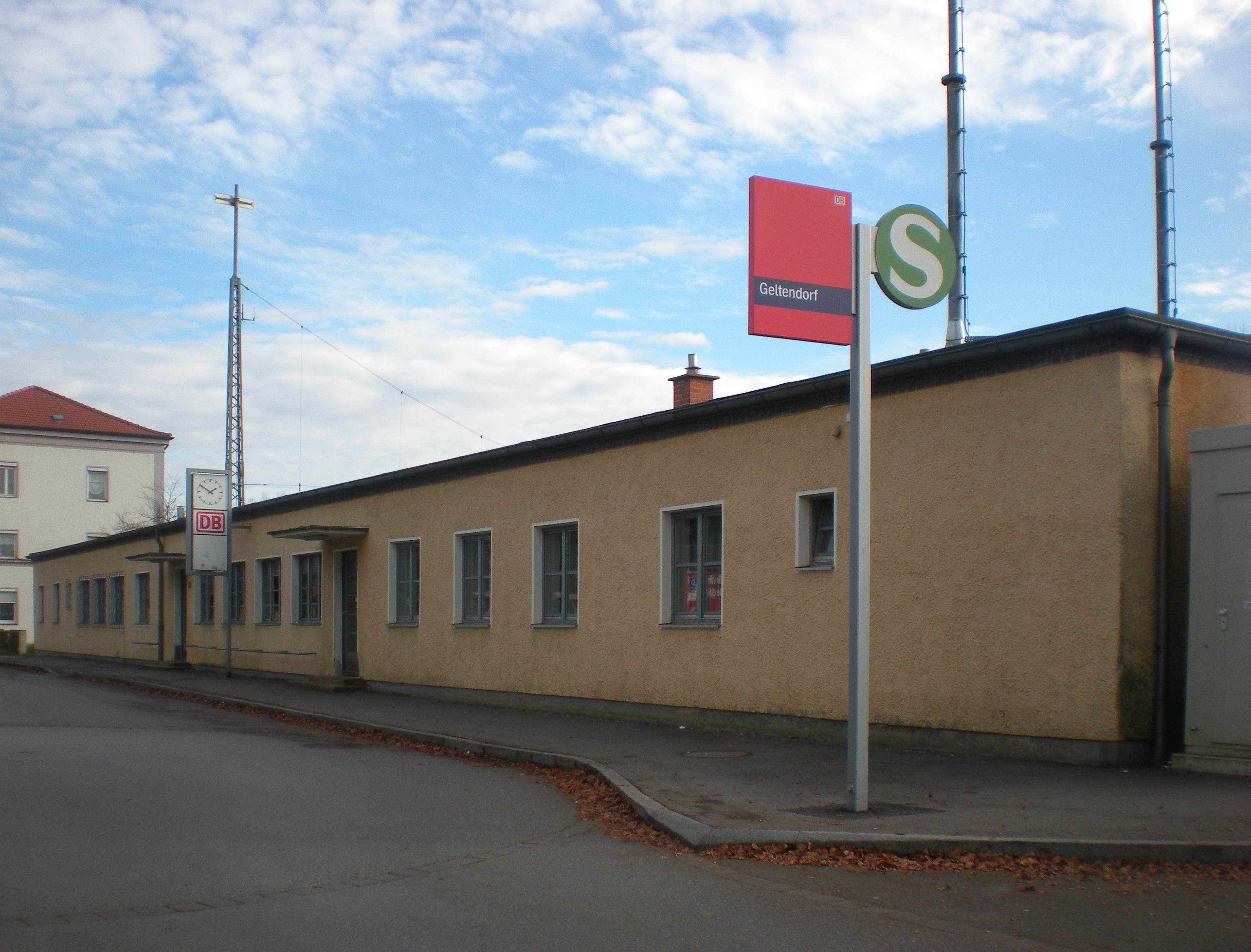 Bahnhofsgebäude des Bahnhofs Geltendorf aus dere Straßenansicht